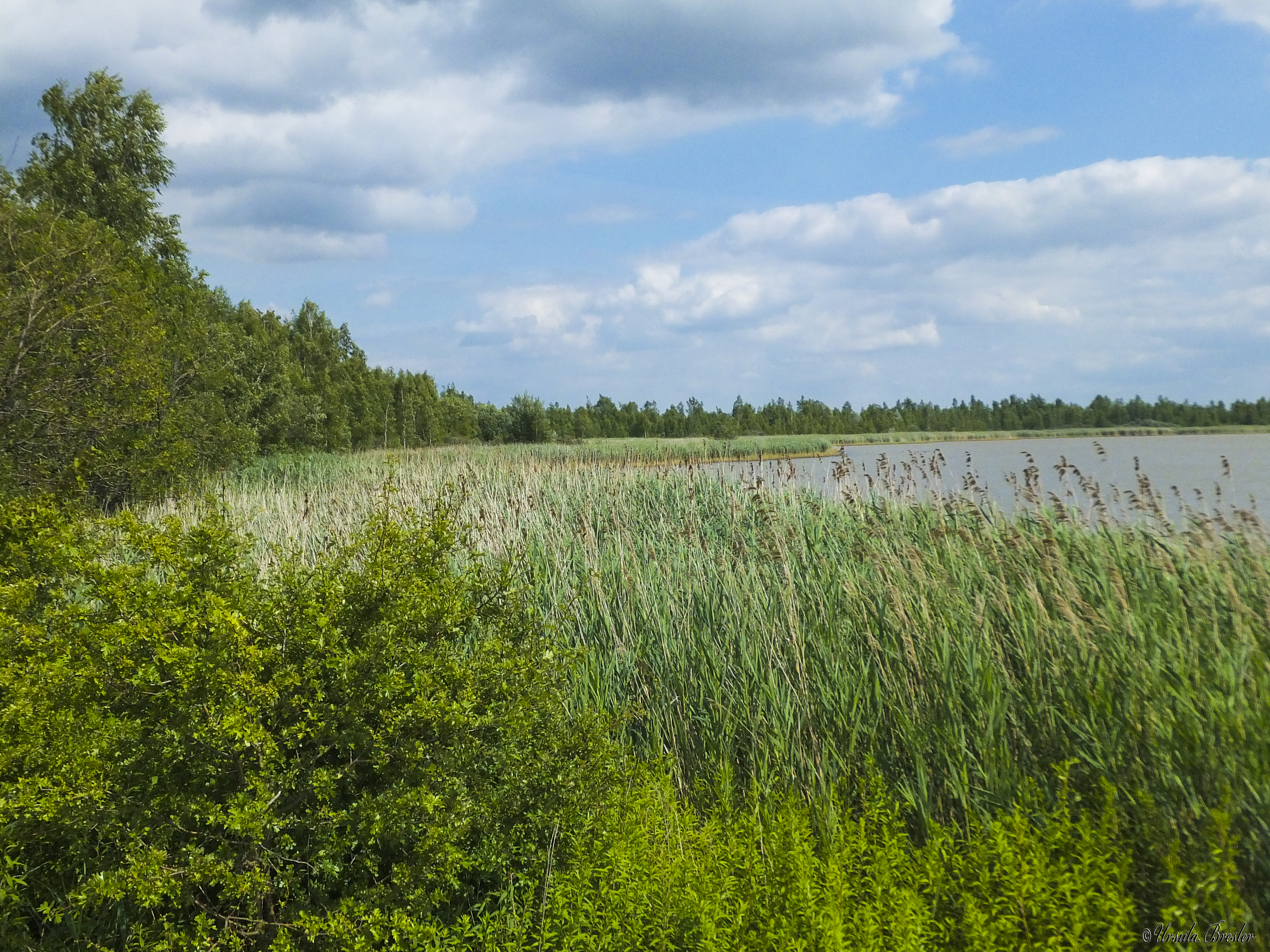 Europäisches Vogelreservat Heerter See / Deutschland,Niedersachsen,Salzgitter